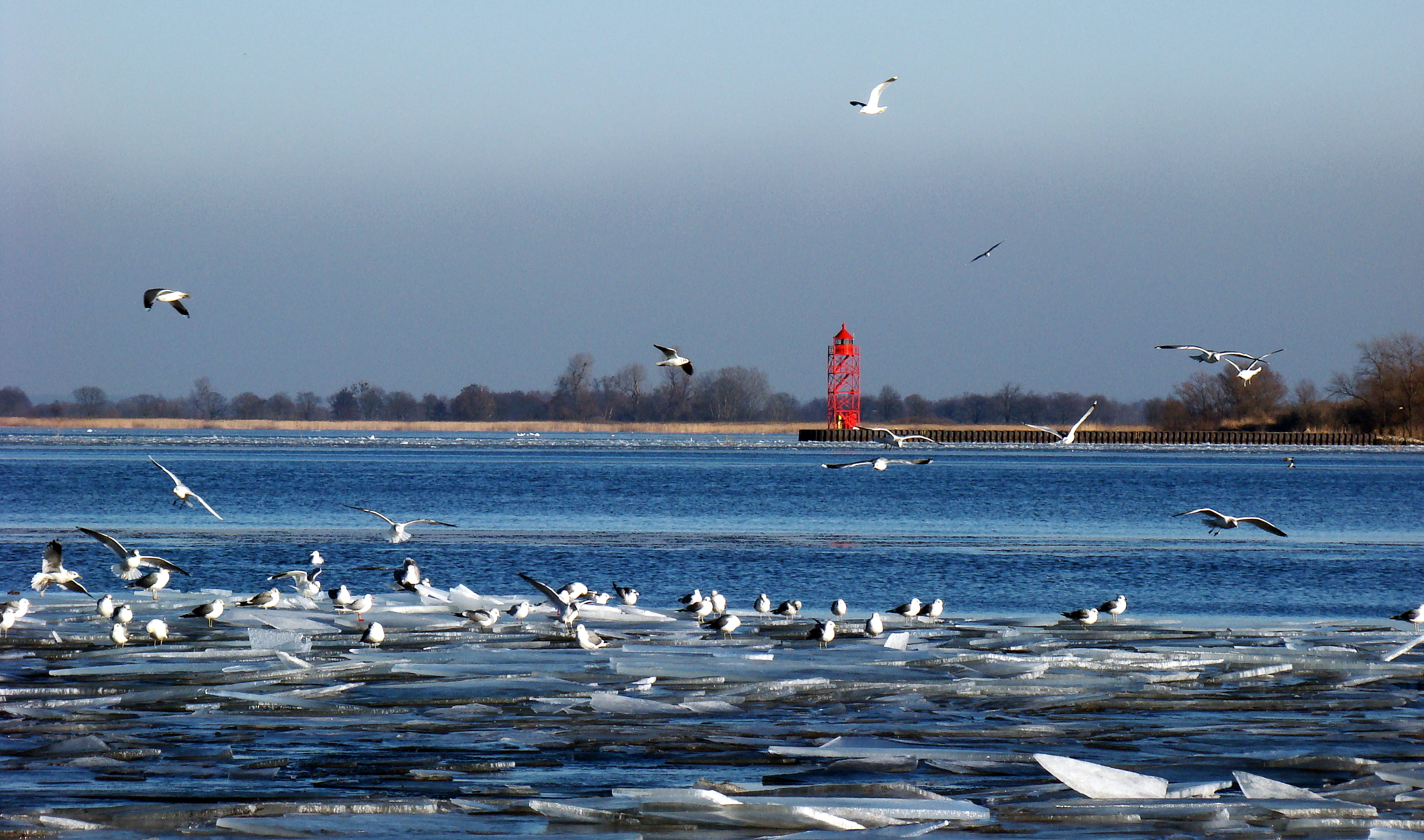 Zalew Szczeciński, Stado mew w tle północna stawa wyspy Chełminek, (Województwo zachodniopomorskie), Polska